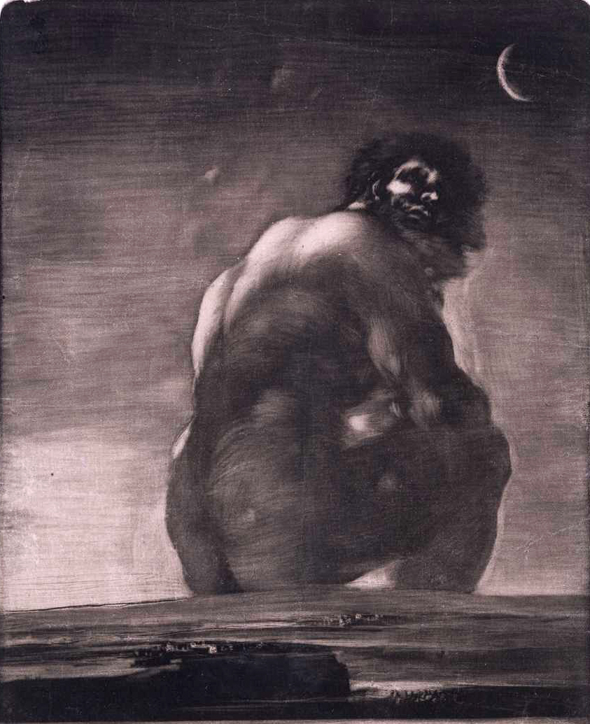 Francisco de Goya, El Gigante o El Coloso (1814-1818), estampa suelta sobre papel verjurado a la aguatinta bruñida. Eliminado el espacio inferior que Goya dejo en blanco para ser destinado a la leyenda o epígrafe. Cfr. pág. 239 de Jesusa Vega, «La técnica artística como método de conocimiento, a propósito de El Coloso de Goya», en Goya: Revista de arte, n.º 324, 2008, págs. 229-244. ISSN 0017-2715.